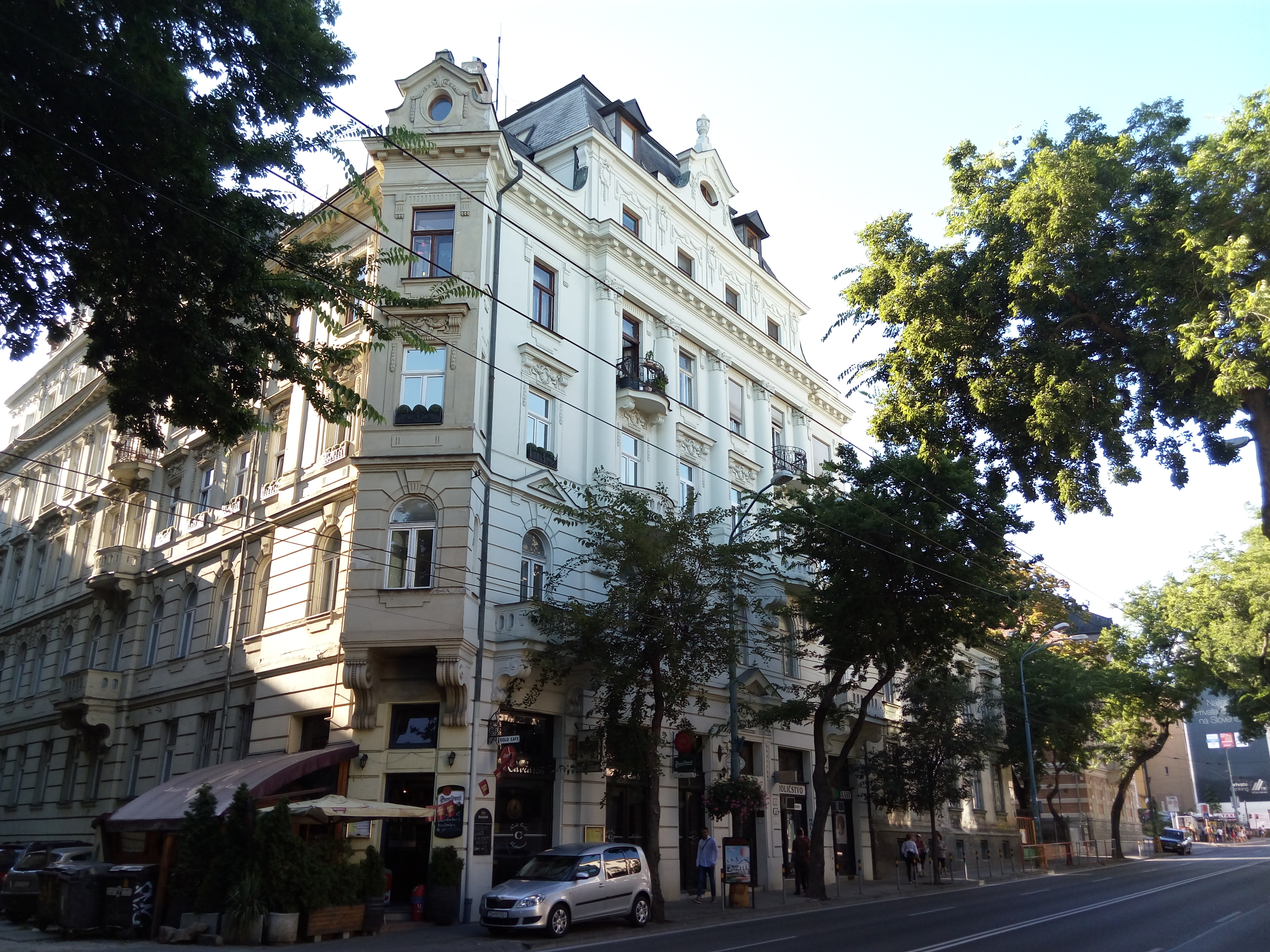 Štefánikova 33, Staré Mesto, Bratislava